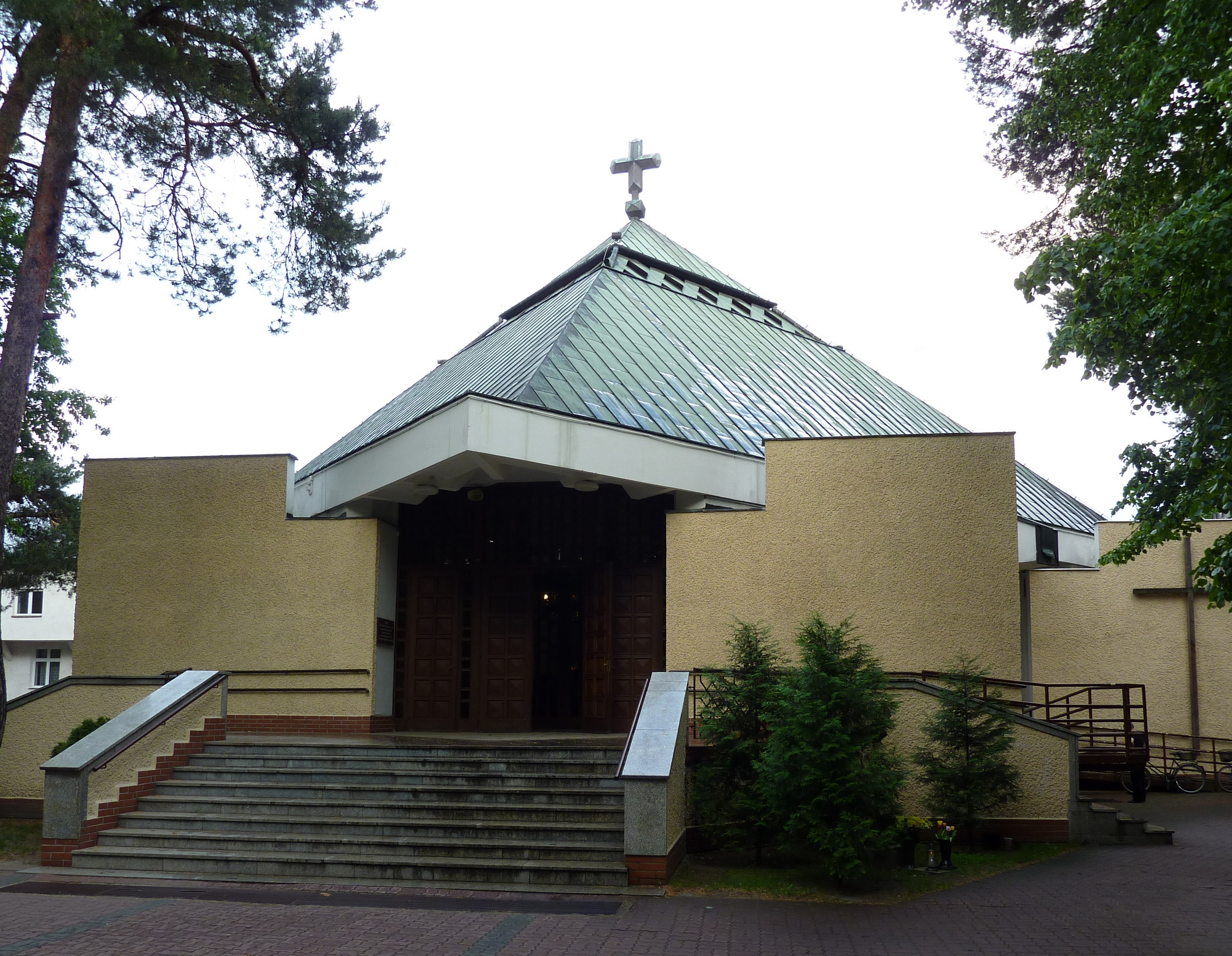 Kościół parafialny pw. Zesłania Ducha Świętego w Otwocku.